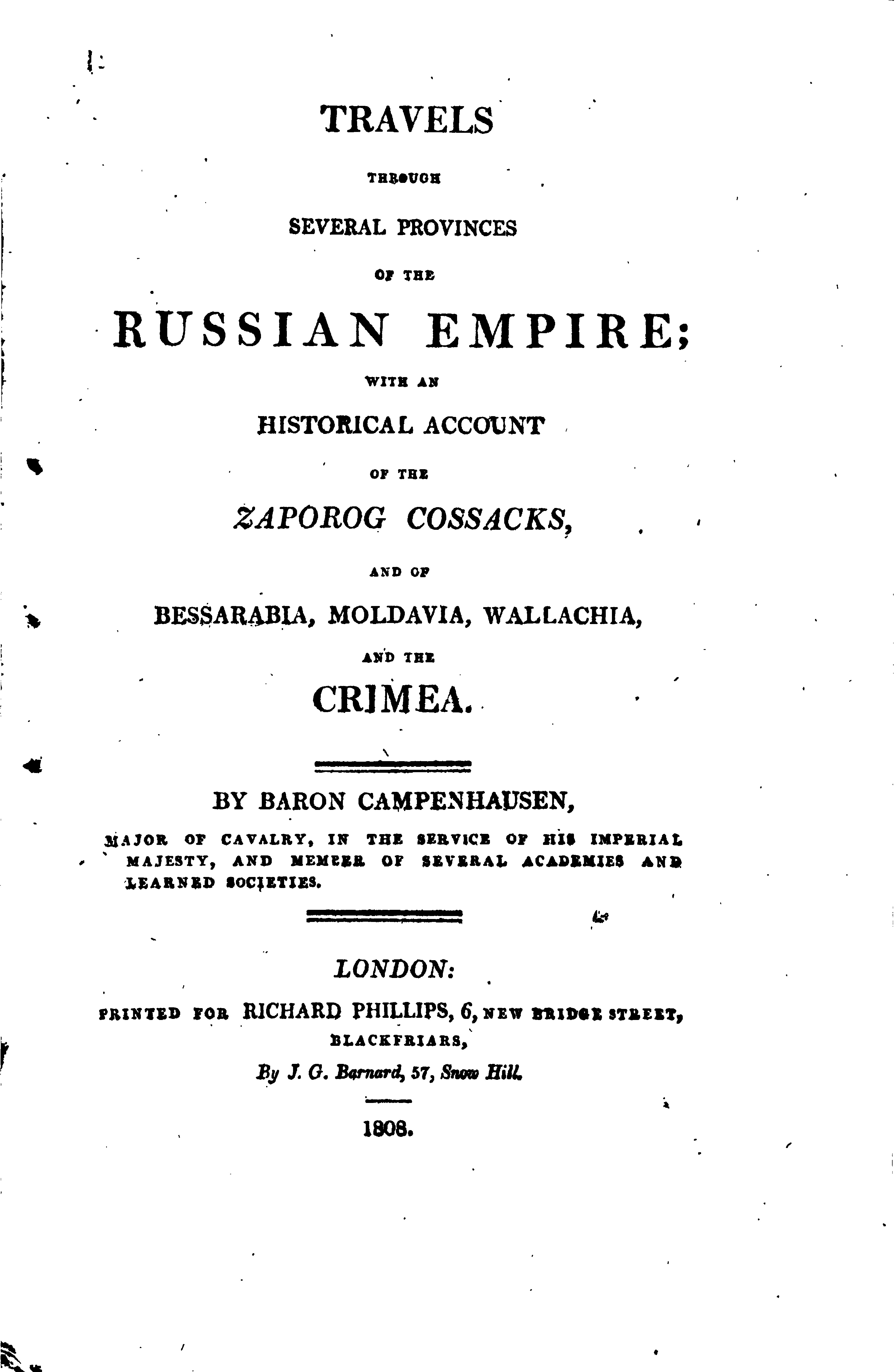 Титульна сторінка "Подорожі кількома провінціями Російської імперії; з історичними свідченнями про Запорізьких козаків, а також про Бессарабію, Молдавію, Валахію і Крим"